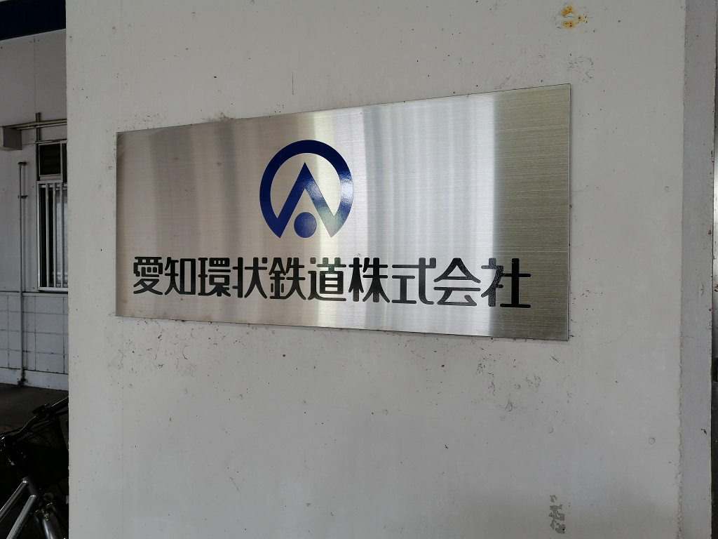 愛知環状鉄道株式会社 本社（北野桝塚駅構内）